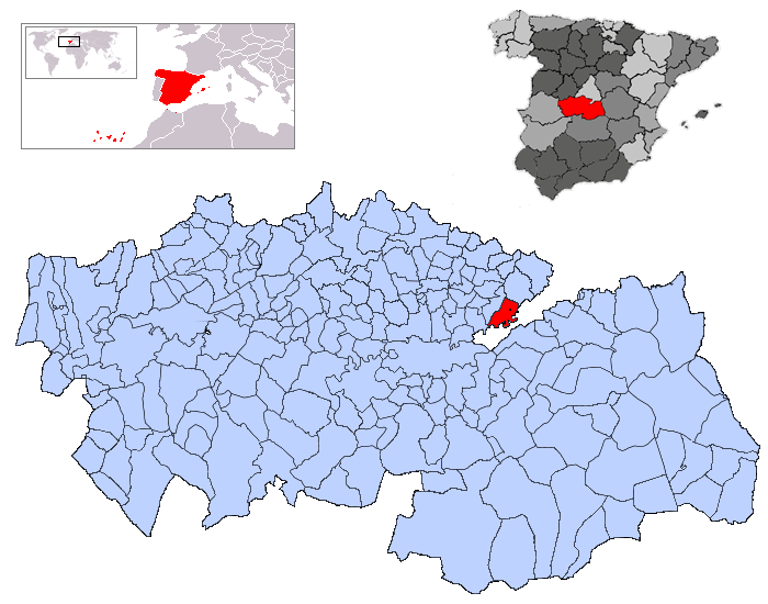 Añover de Tajo en la provincia de Toledo